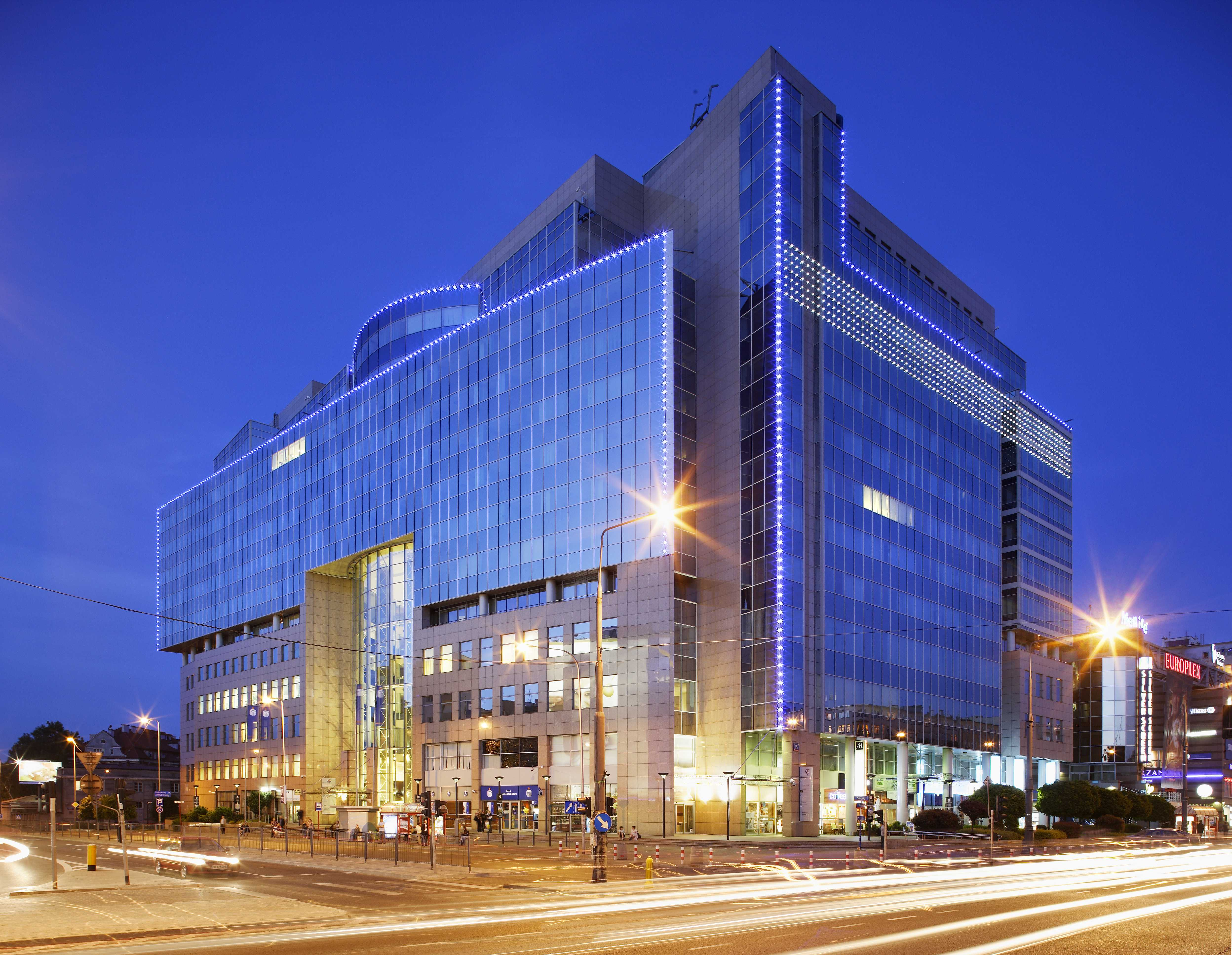 Siedziba Domu Maklerskiego PKO BP w Warszawie, Puławska 15.